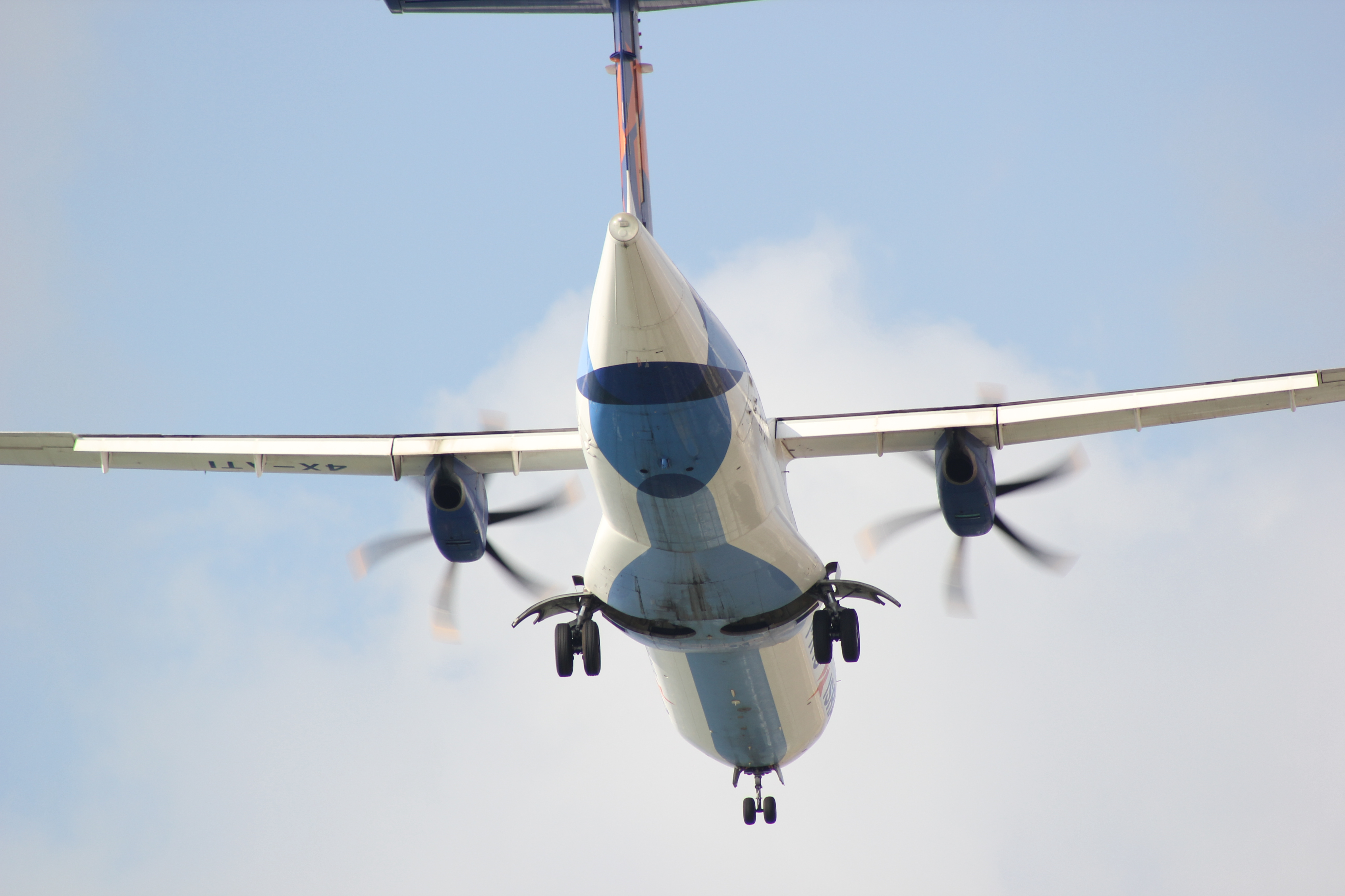 מטוס Airbus A320-232 של ישראייר לאחר המראה משדה דב.